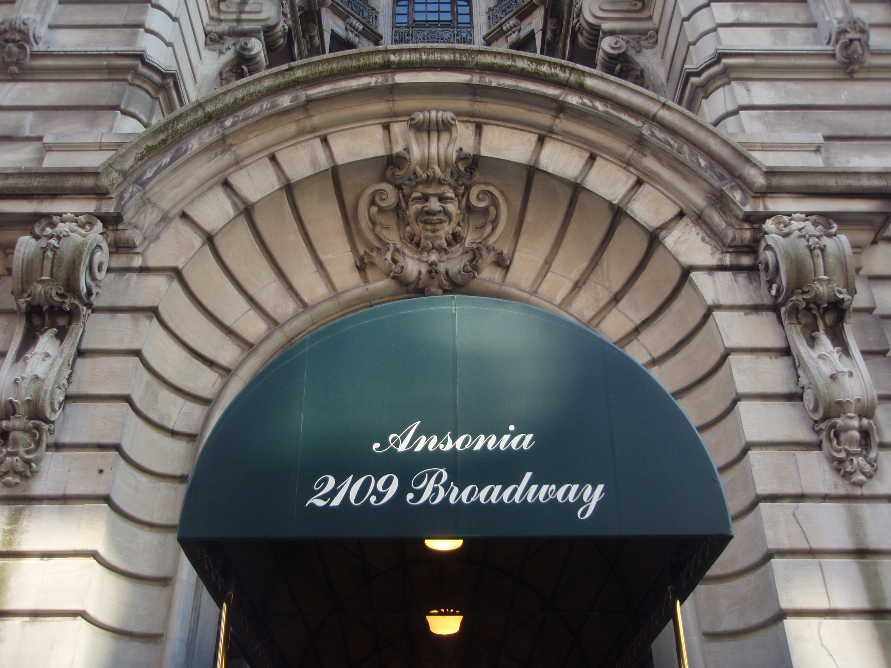 Entrée de l'Ansonia (New York).